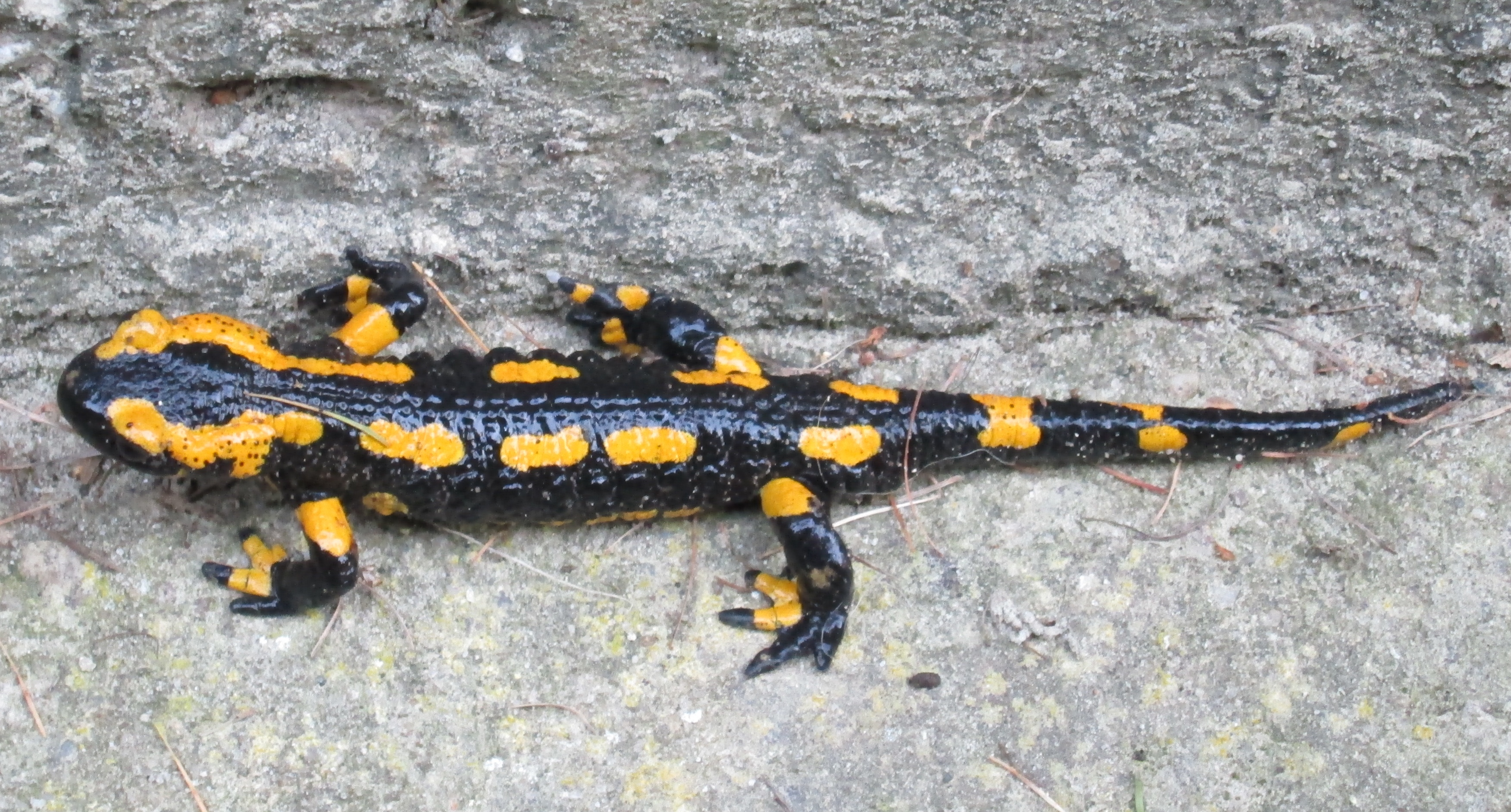 Feuersalamander (aufgenommen im Harz; Herbst 2014)